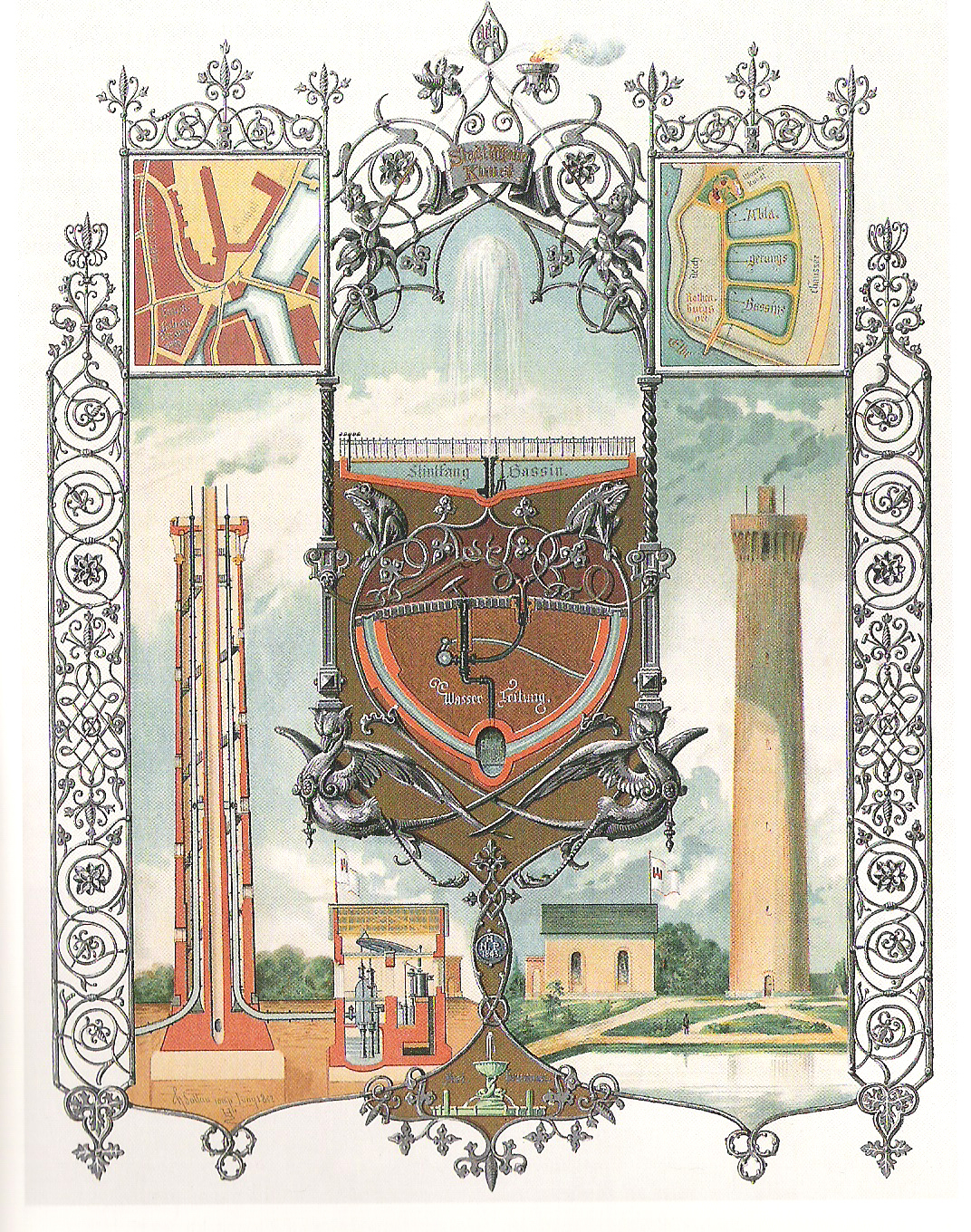 Hamburg, Germany: Gedenkblatt für die Stadtwasserkunst 1852; links oben eine Skizze des Hauptröhrenknotens am Meßberg; rechts oben die drei Ablagerungsbassins in Rothenburg; unten rechts der "Wasserturm" in Rothenburgsort und links unten dessen Querschnitt.This is a photograph of an architectural monument.